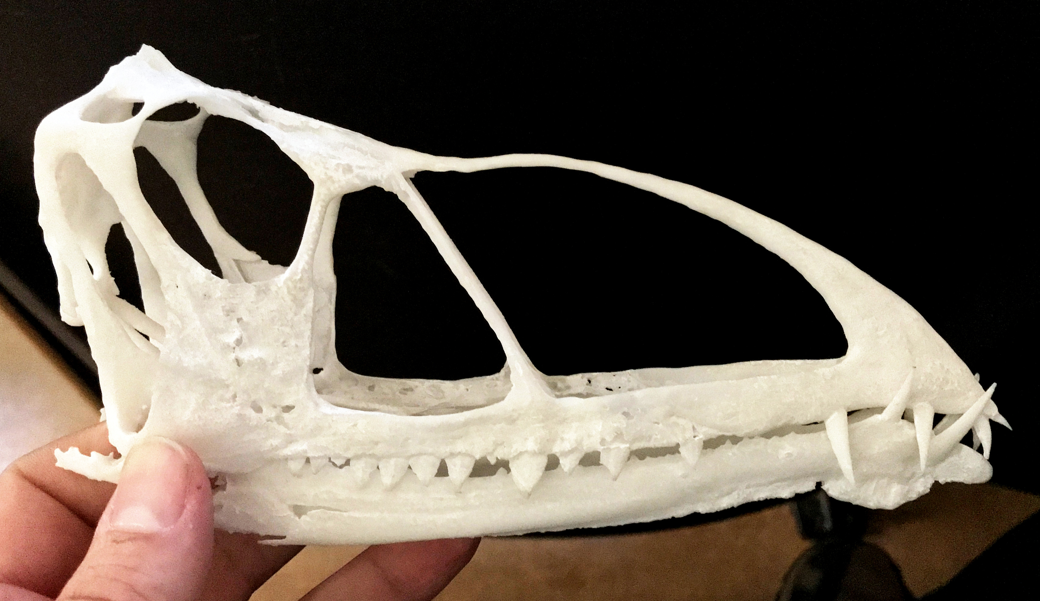 3D printed skull of Caelestiventus hanseni.